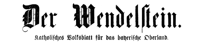 Der Wendelstein - Zeitungskopf